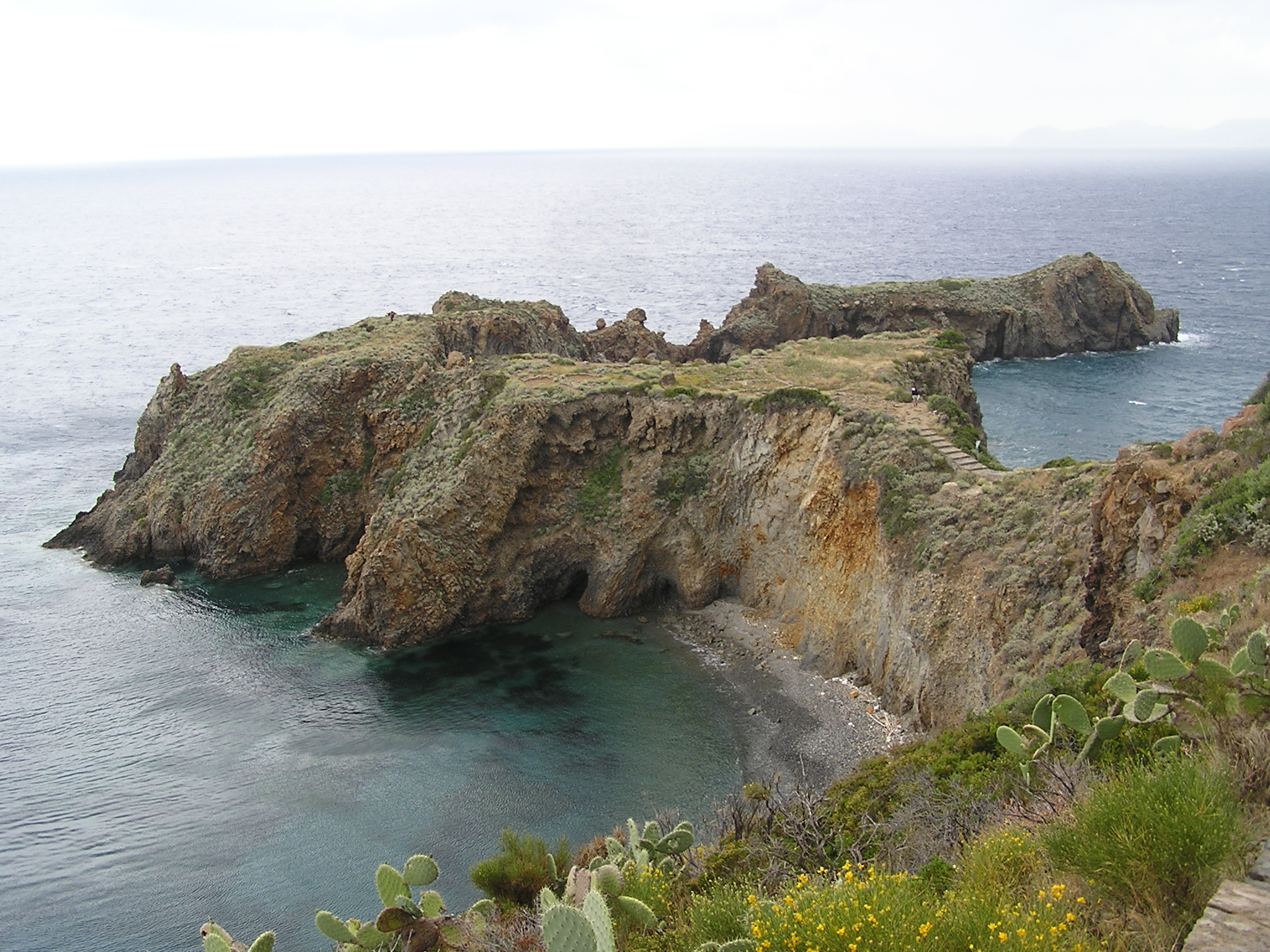 Panarea, villaggio preistorico di Capo Milazzese.